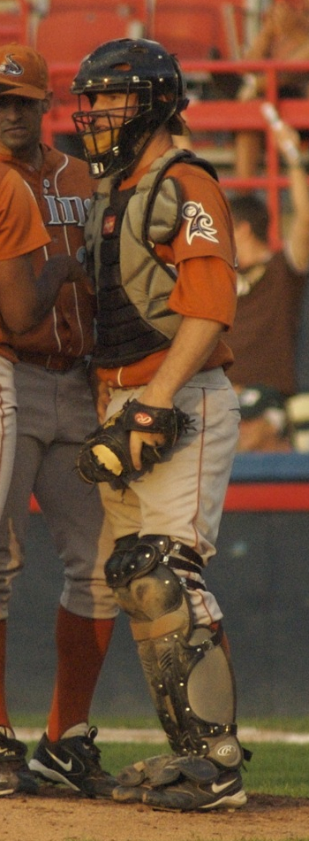 Bryan Anderson